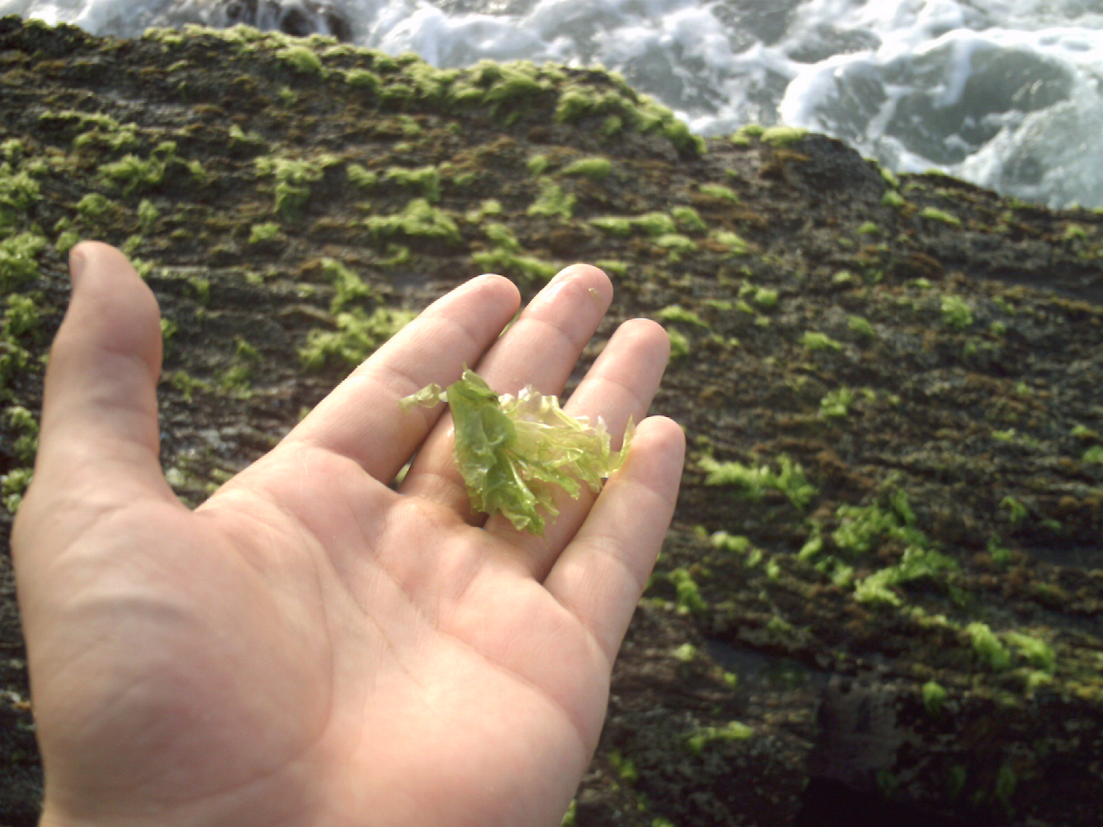 Ejemplo de un alga pluricelular. Runa Simi: Huk q'umir laqu, runap makinpi.